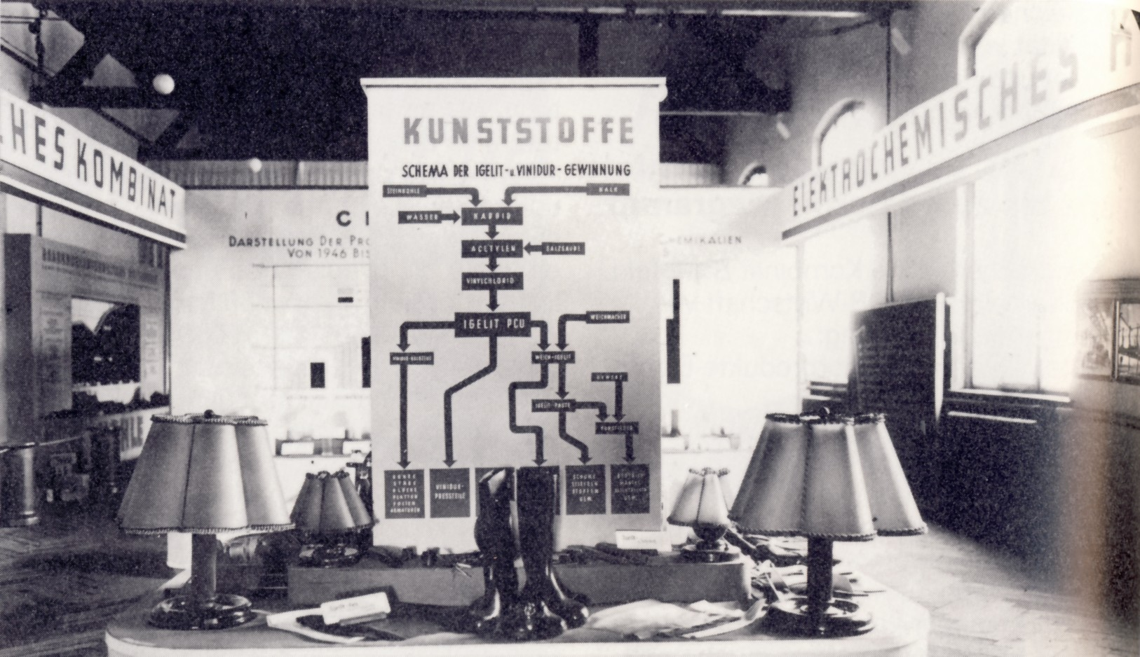 In den 1950er Jahren waren Erzeugnisse aus Igelit und Vinidur sehr gefragt